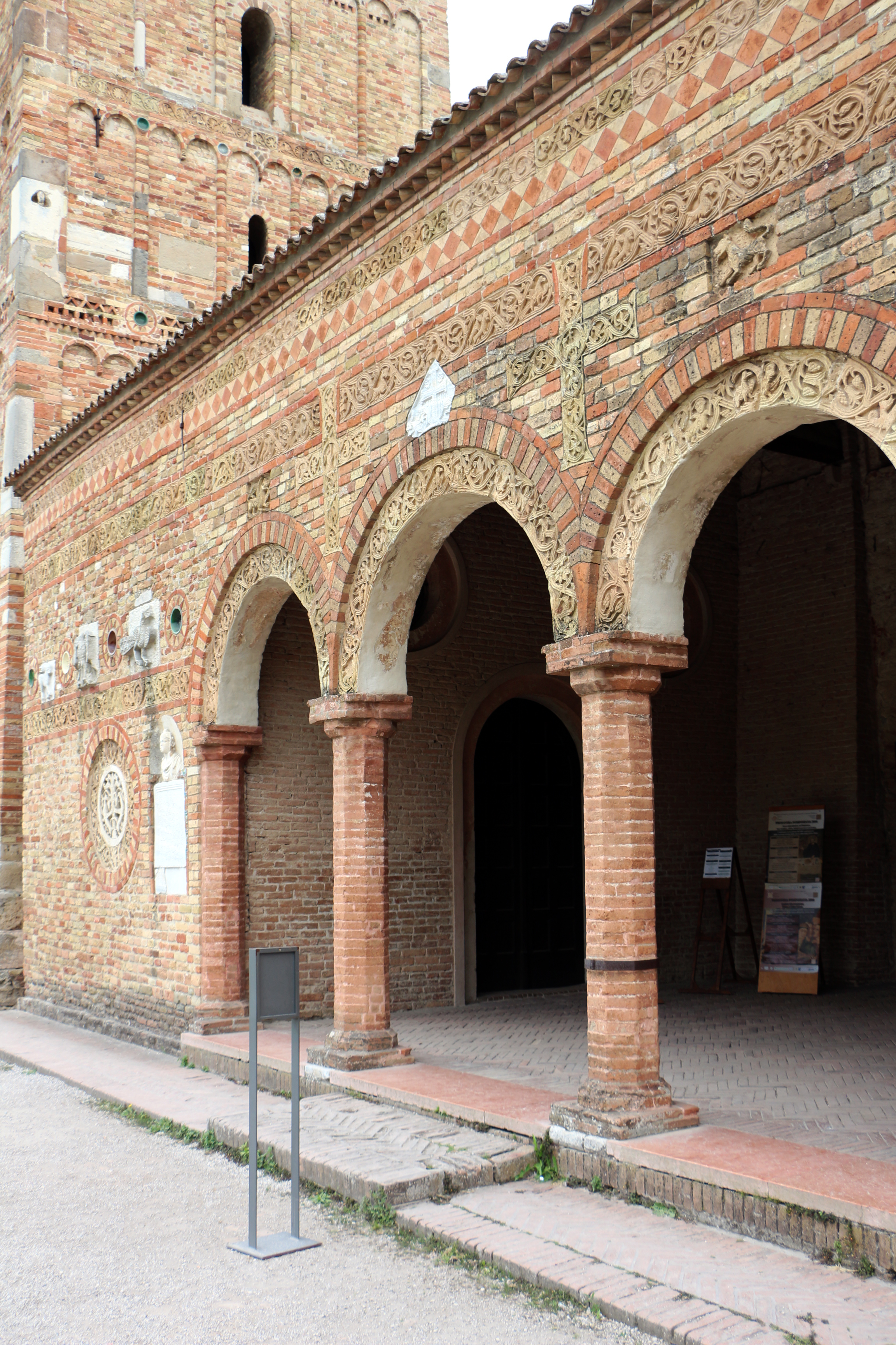 Abbazia di Pomposa This is a photo of a monument which is part of cultural heritage of Italy.